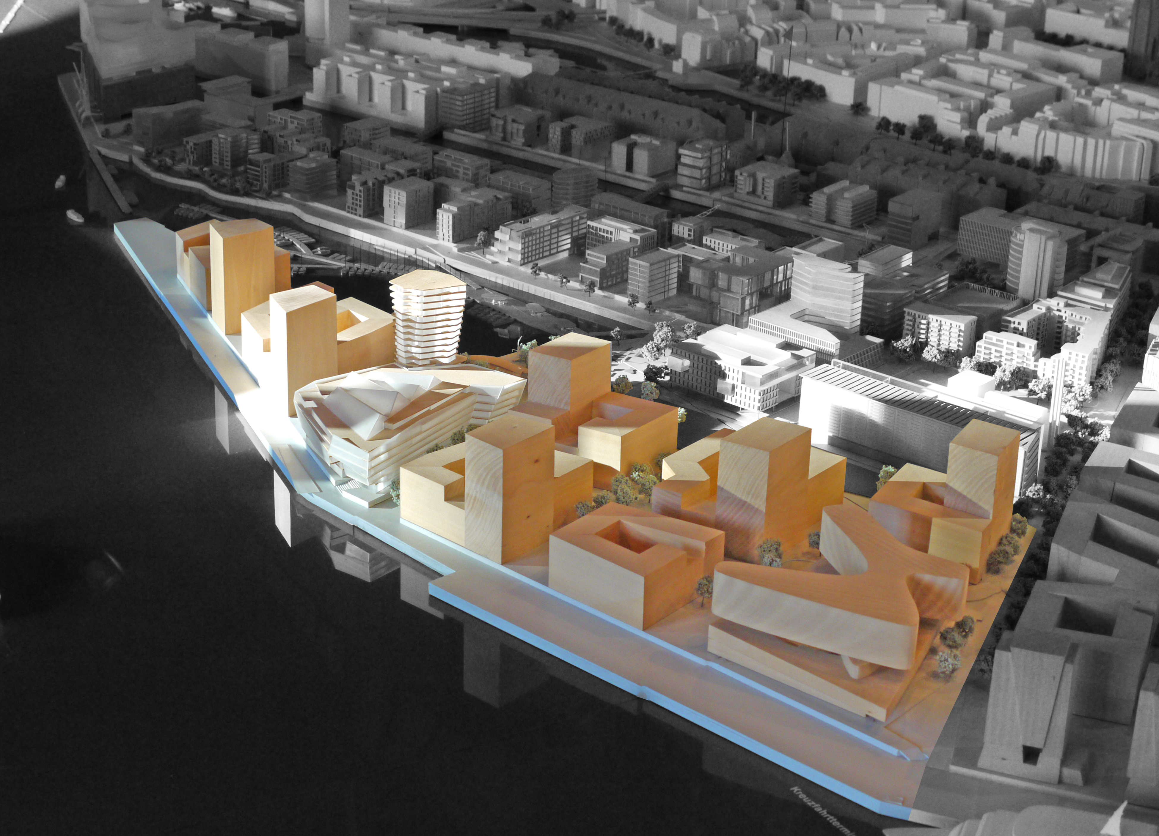 Modell des Quartiers Strandkai in der HafenCity in Hamburg.